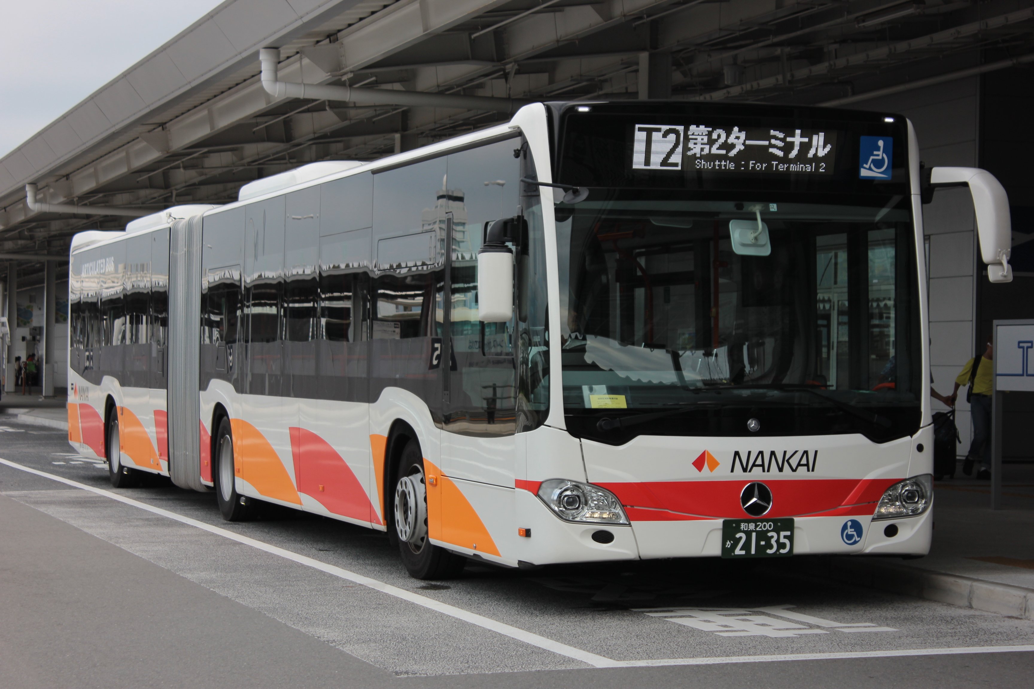 南海バスの連節バス（関西国際空港第2ターミナル） Canon EOS Kiss X5